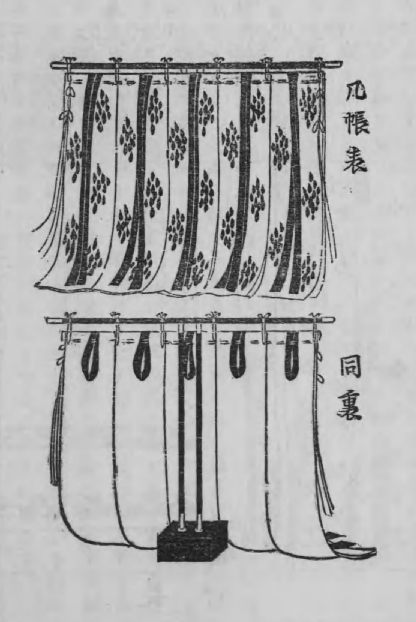 「几帳」宮殿調度図解 (1905年) 東京：六合館書店刊 関根正直著